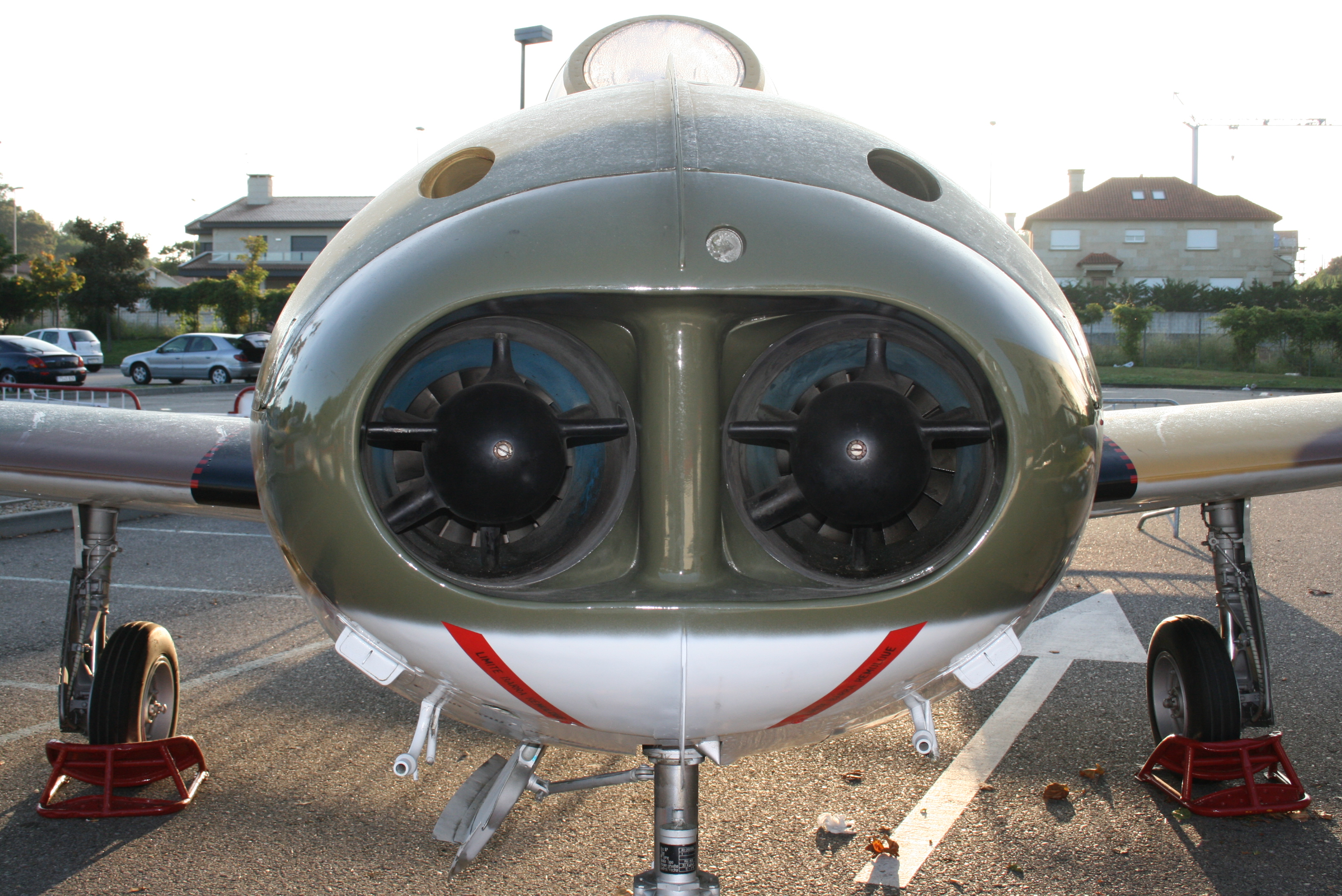 Cazabombardero Hispano Aviación HA-220 Super Saeta (C-10C) del Ejército del Aire español, expuesto en un aparcamiento de la playa de Samil, en Vigo (Galicia, España). Strike fighter Hispano Aviación HA-220 Super Saeta (C-10C) of the Spanish Air Force, exposed in a parking of Samil's beach, in Vigo (Galicia, Spain).